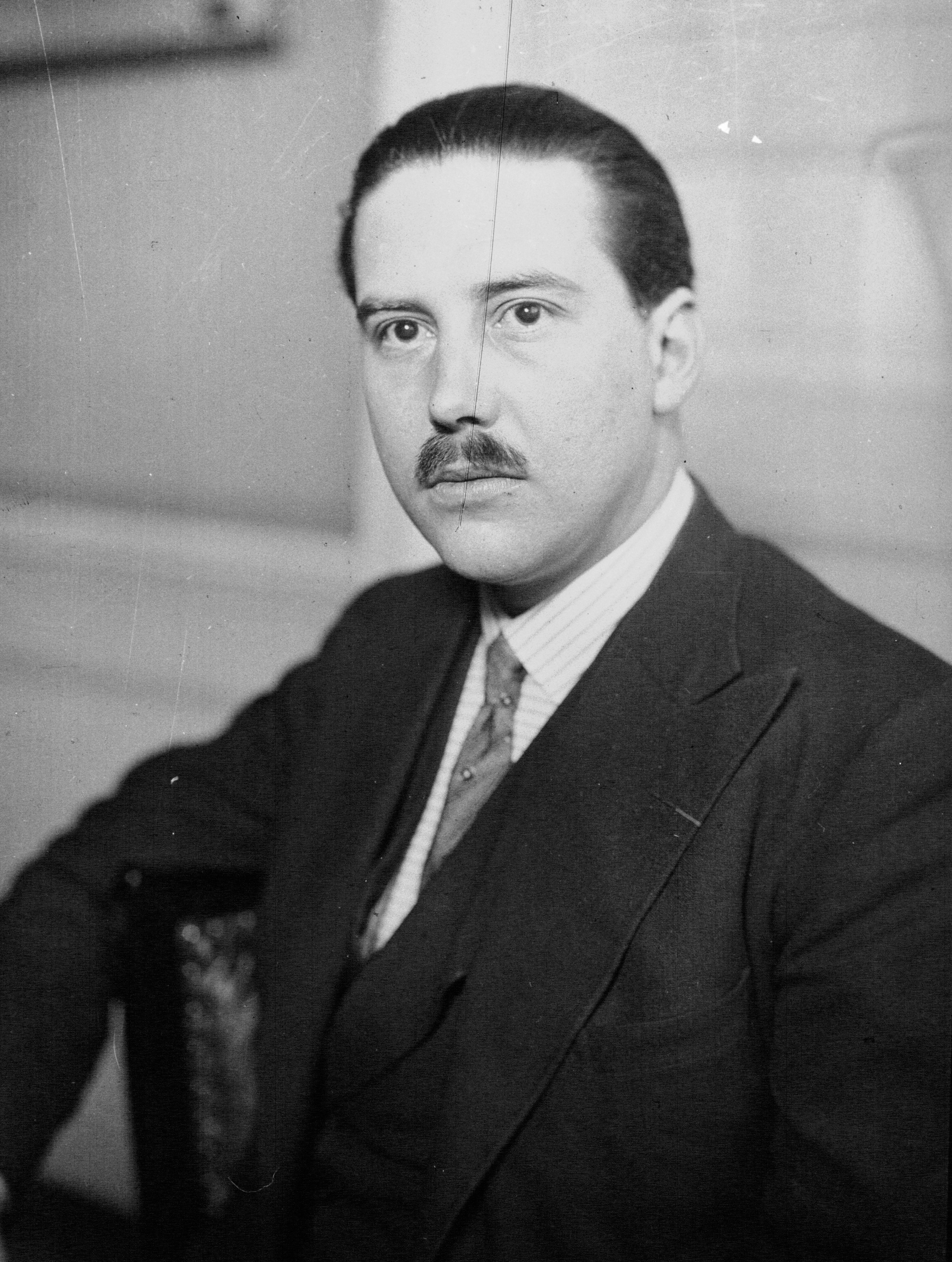 Guy La Chambre, sous-secrétaire d'Etat à la Présidence du Conseil